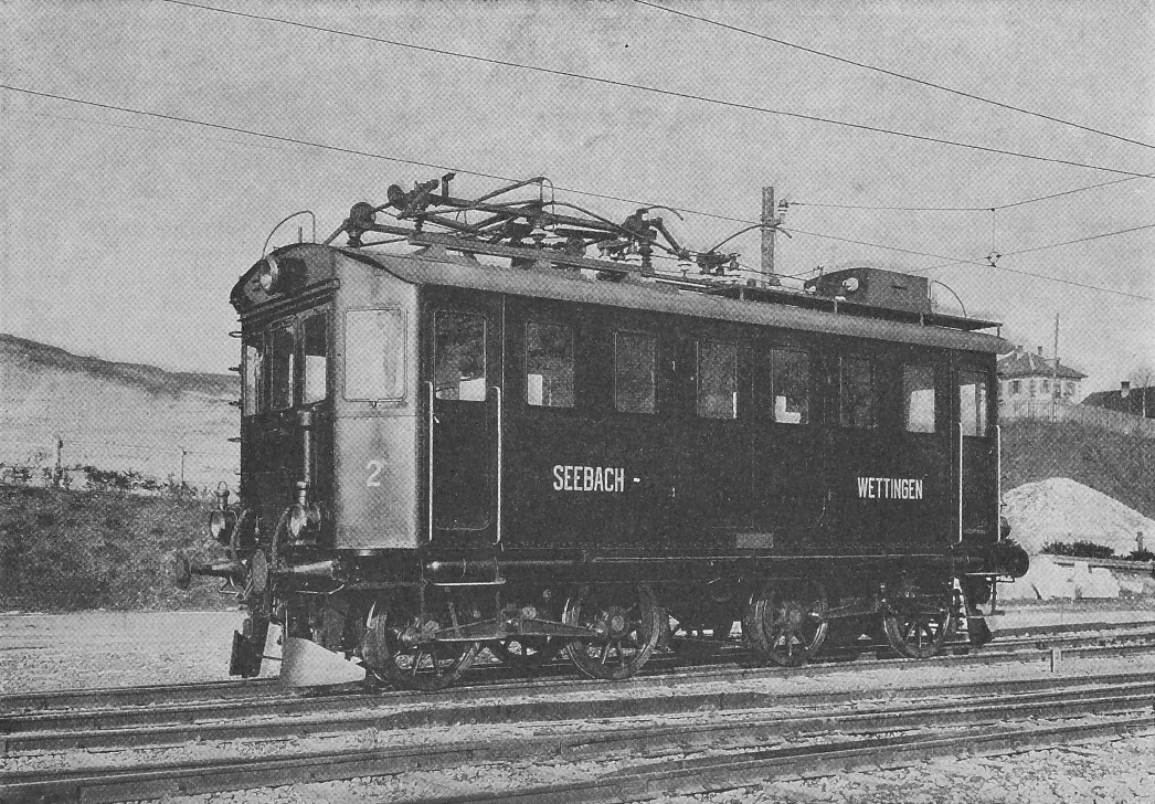 Versuchsbetrieb Seebach-Wettingen: Lokomotive MFO Nr. 2 mit Bügel- und Rutenstromabnehmern.